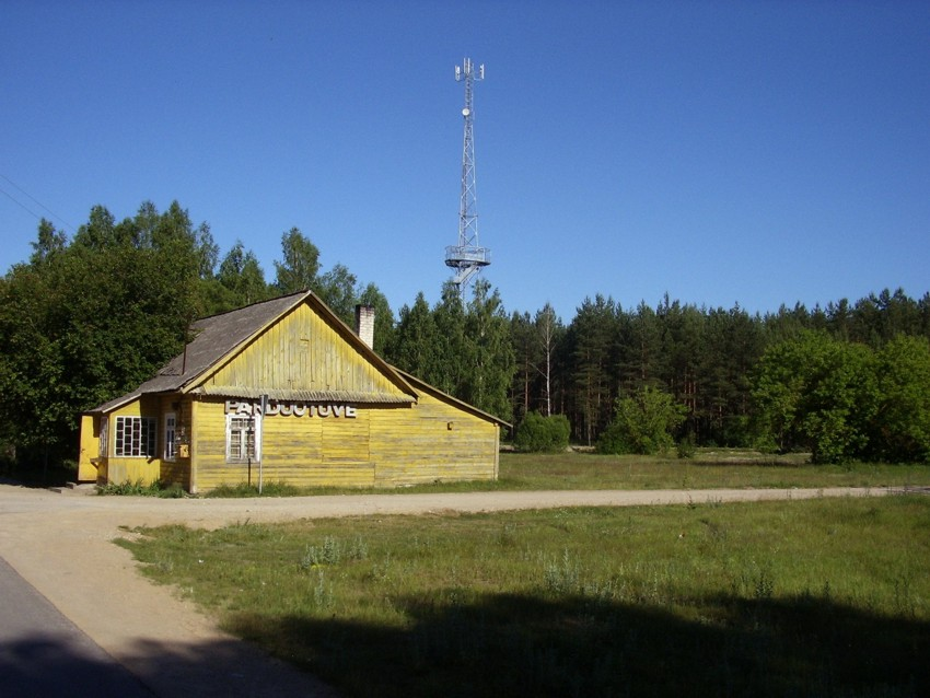 Puvočių parduotuvė